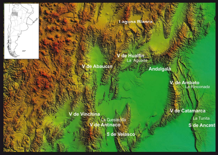 Mapa donde se han hallado registros materiales correspondientes con Aguada